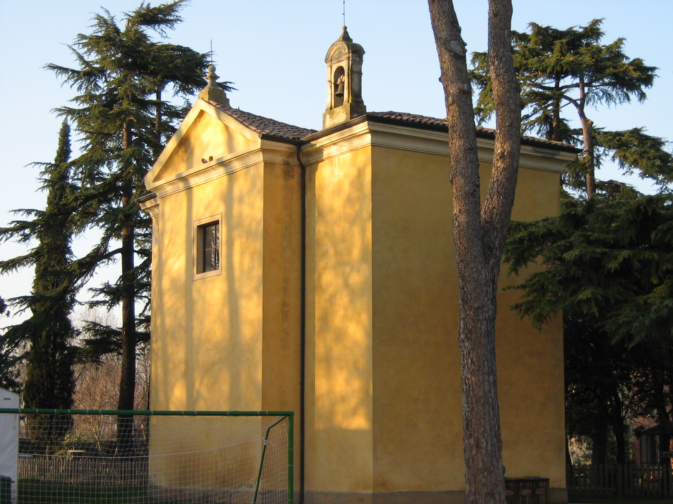 Cappella appartenente al complesso di villa Buri